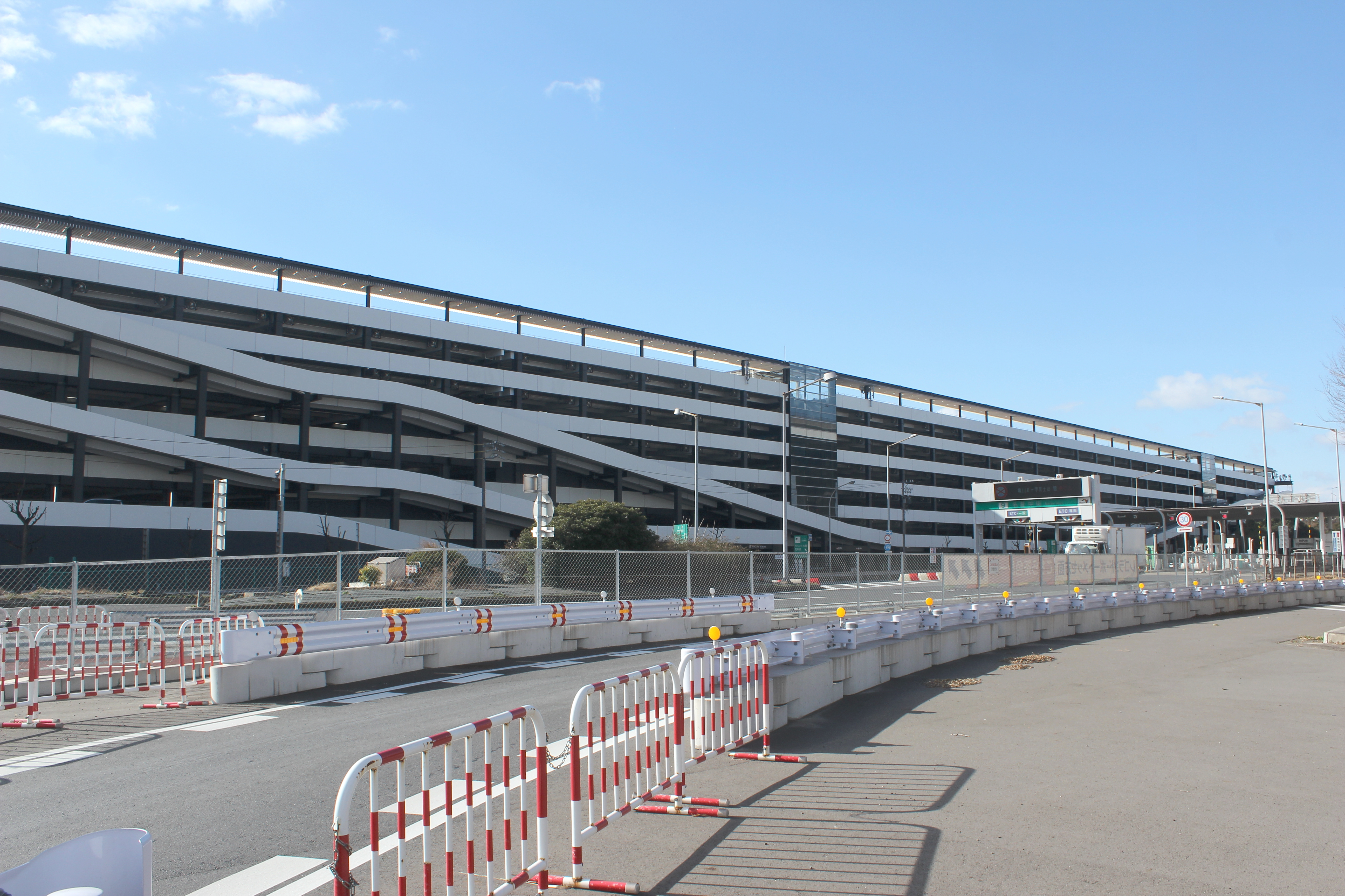 名港中央インターチェンジと名古屋市金城ふ頭駐車場